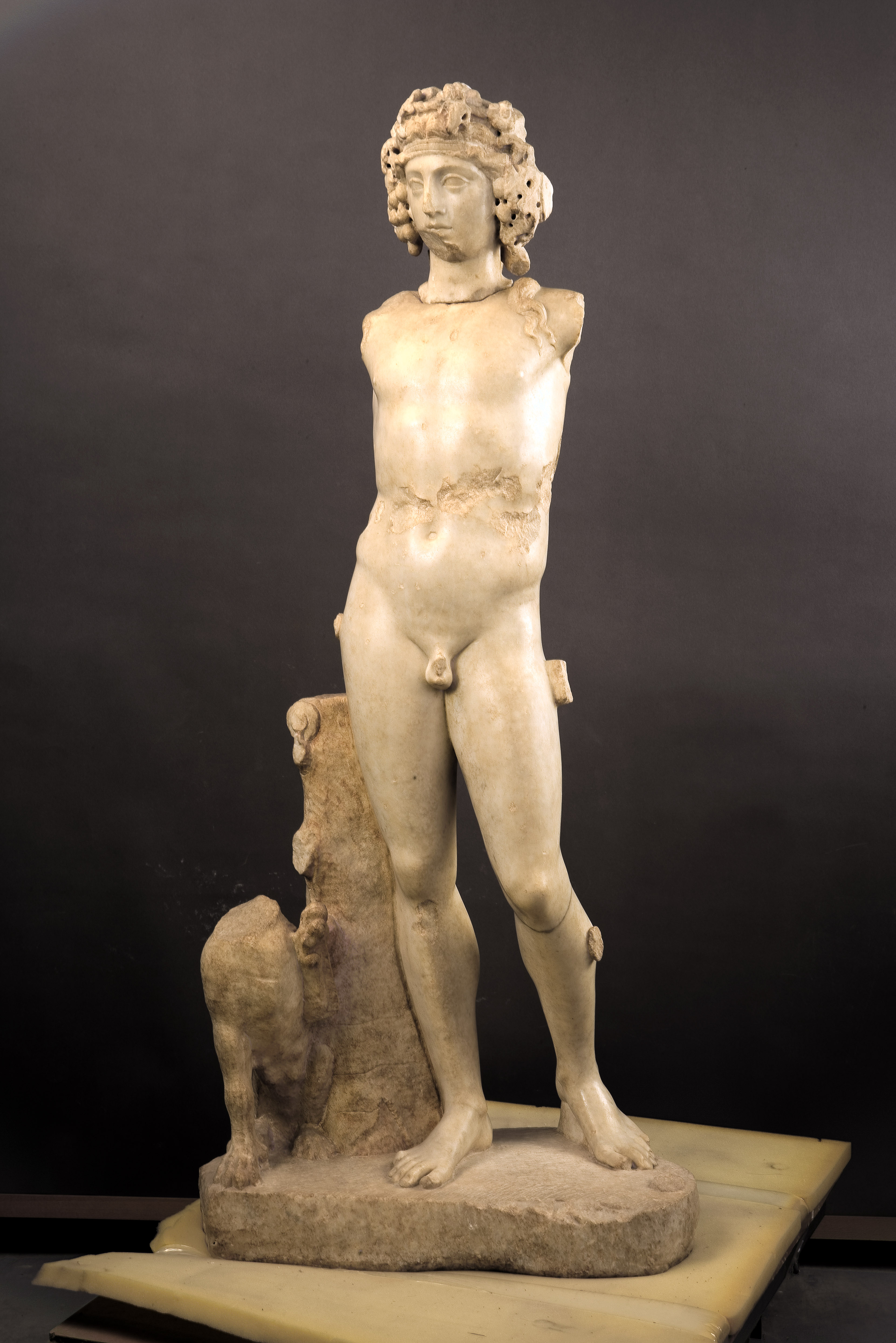 Dios Baco encontrado en Chirivel (Almería), se expone en el Museo de Almería